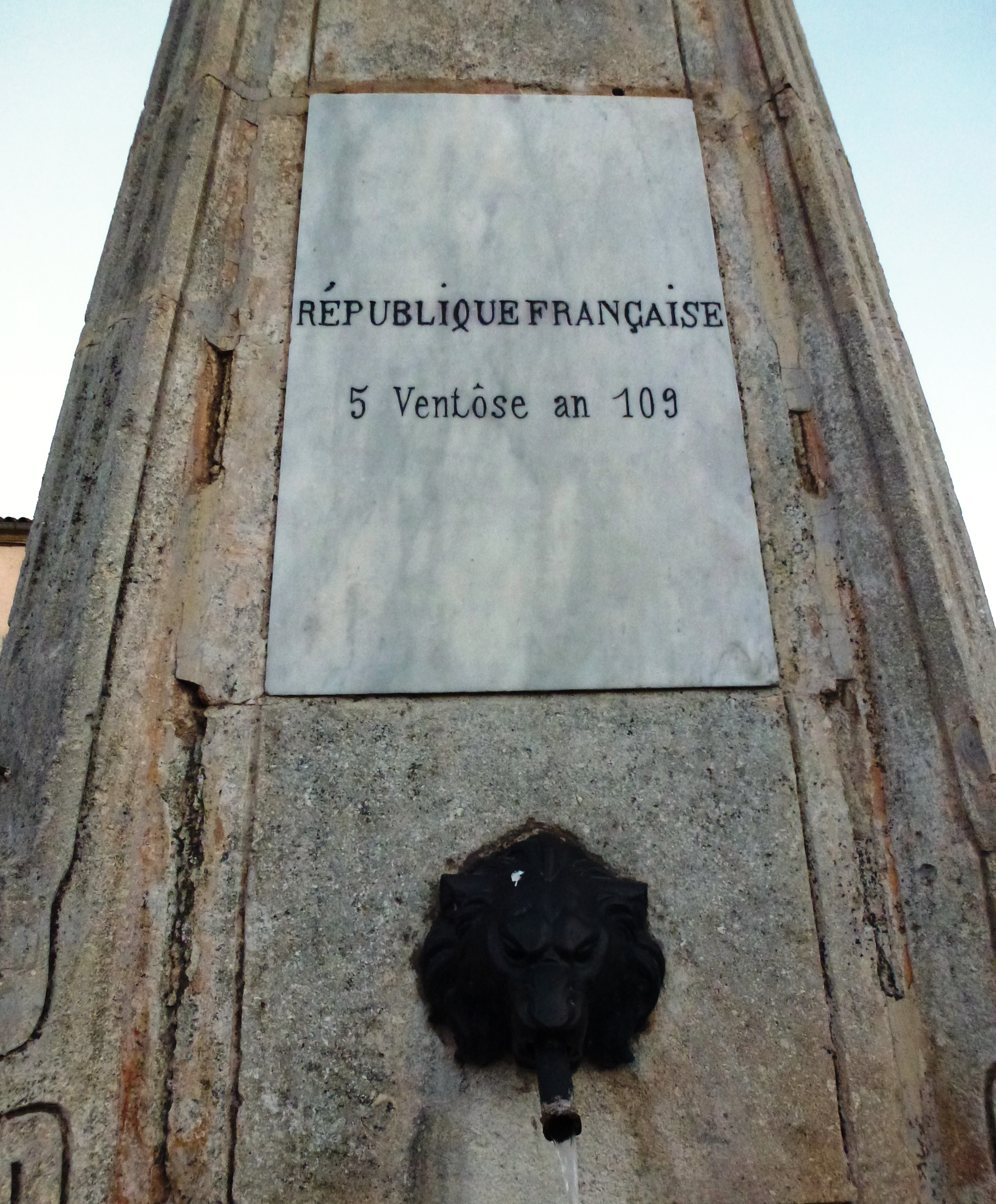 Fontaine sur la grand-place d'Octon (Hérault) dont la date d'érection est indiquée suivant le calendrier républicain